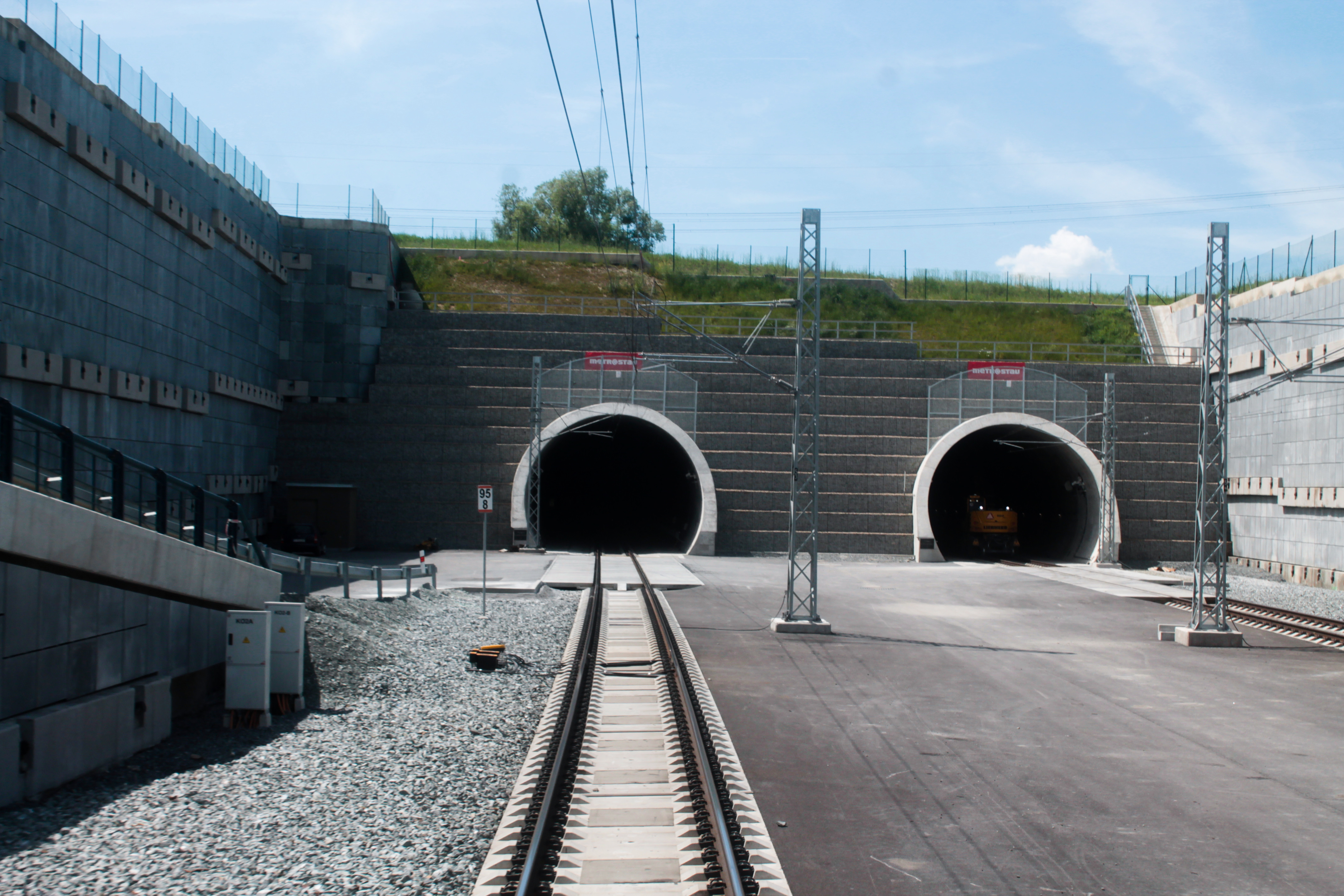 východní (Rokycanský) portál Ejpovických tunelů, 2. června 2019